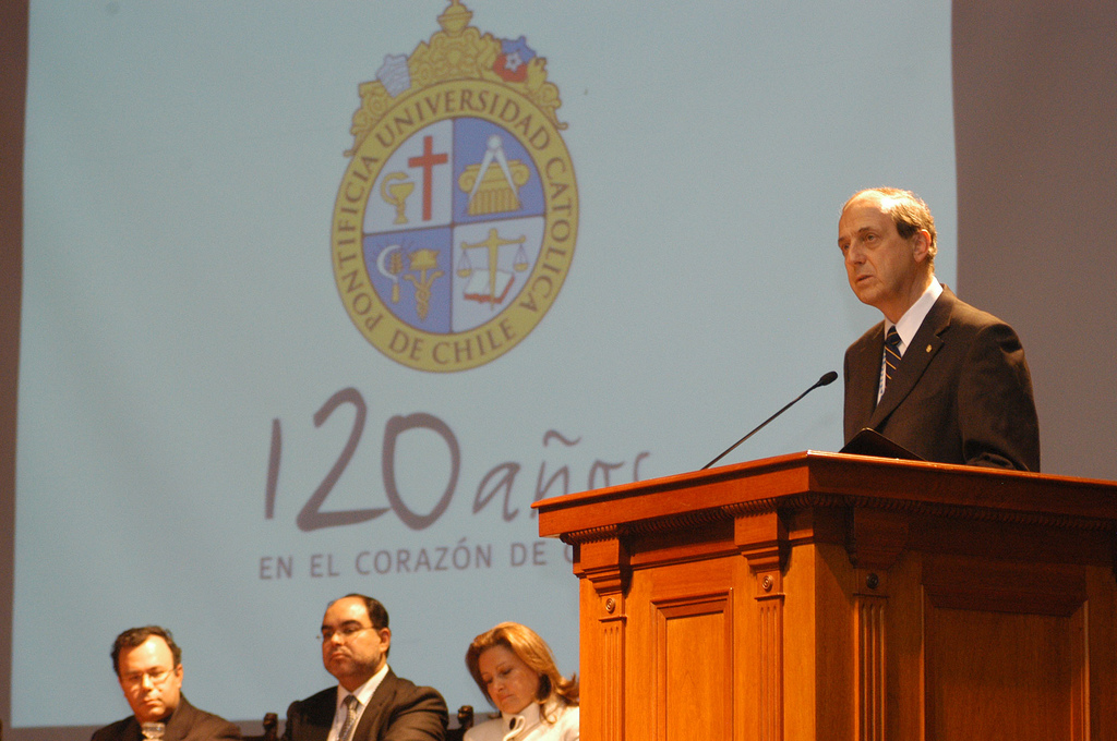 El rector Rosso señaló que el principal aporte de la UC al país son sus ex alumnos. En diferentes actividades académicas y artísticas se reunieron los miembros de la comunidad universitaria UC, junto a invitados especiales para celebrar su 120° aniversario.